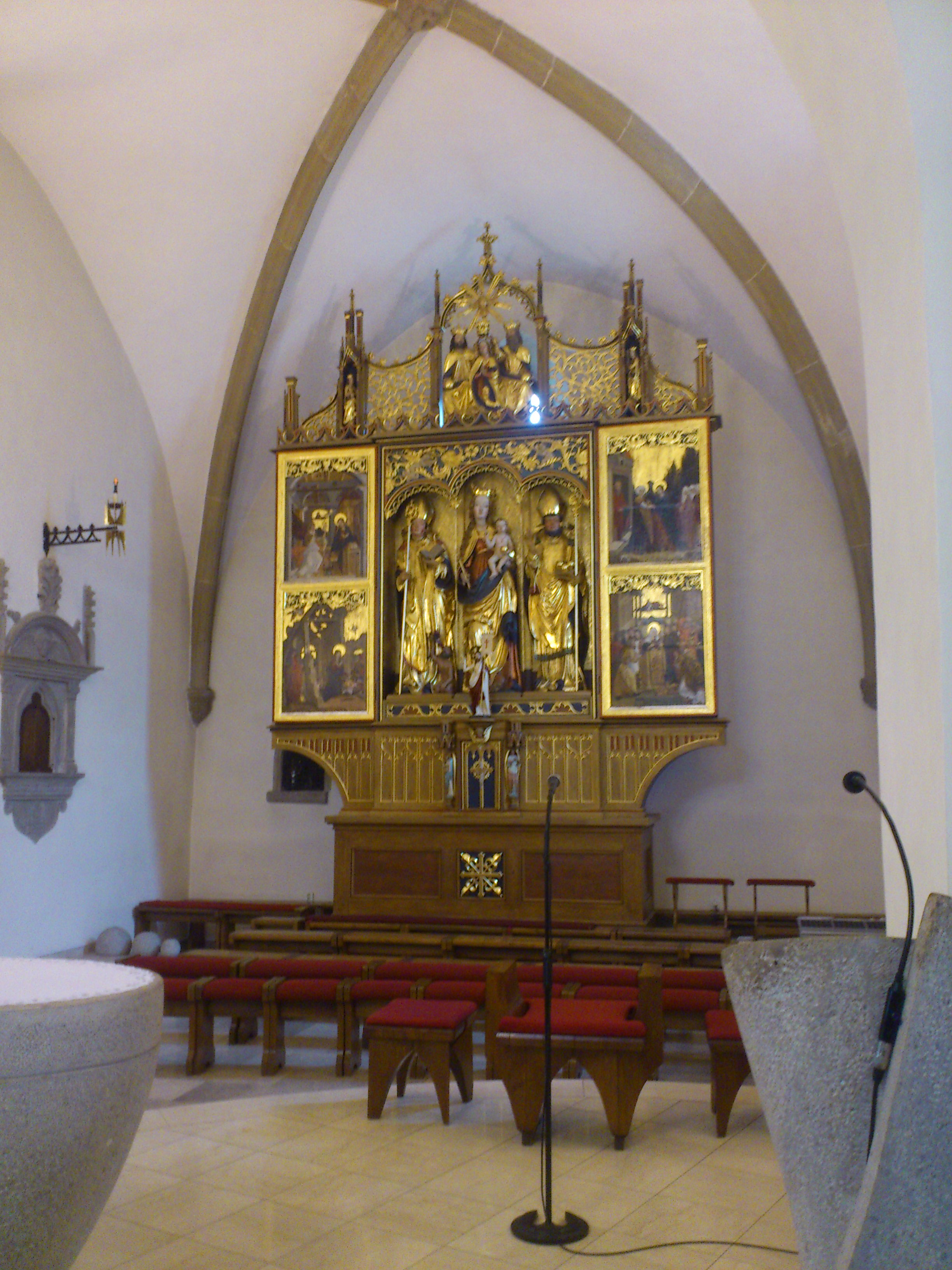 Nachádza sa v presbytériu